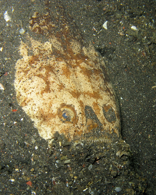 Stargazer